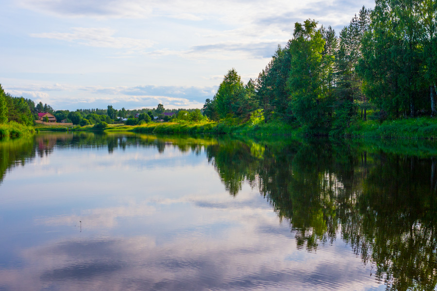 Каменная гора, Бабаевский район This image is related to the protected area of Russia number 3510002